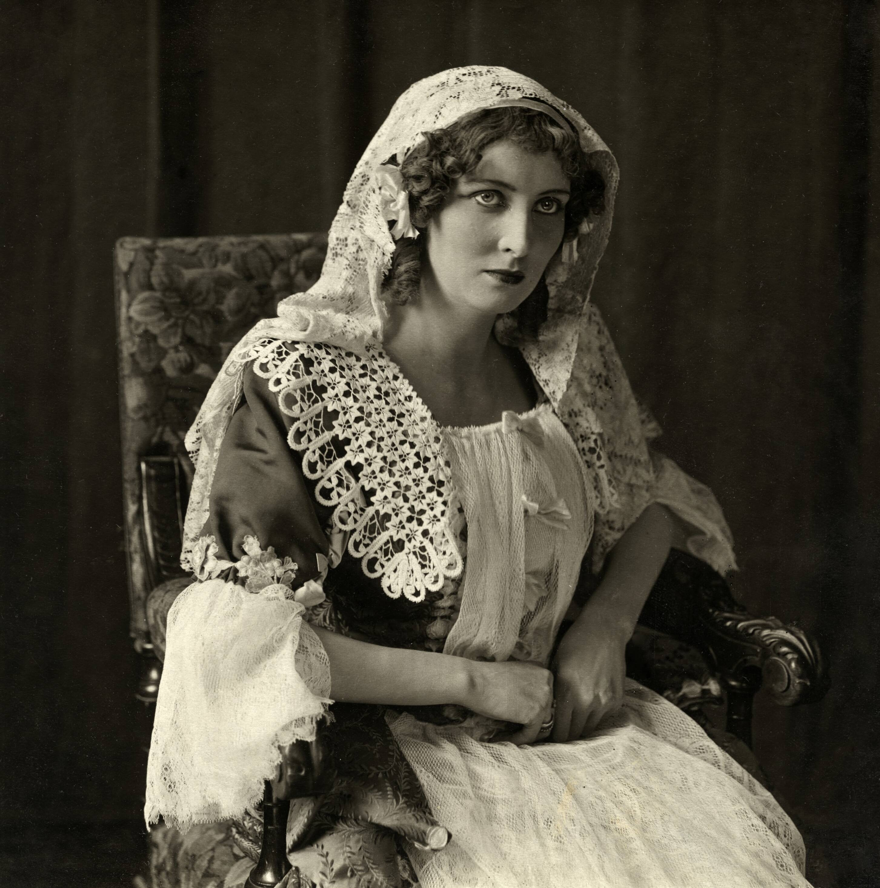 Actrice Mien van Kerckhoven-Kling als Isabelle in het toneelstuk 'De Universele Erfgename' (oorspr.: Le légataire universelle / J.F. Regnard (1706)) Foto uit 1916, plaats onbekend.